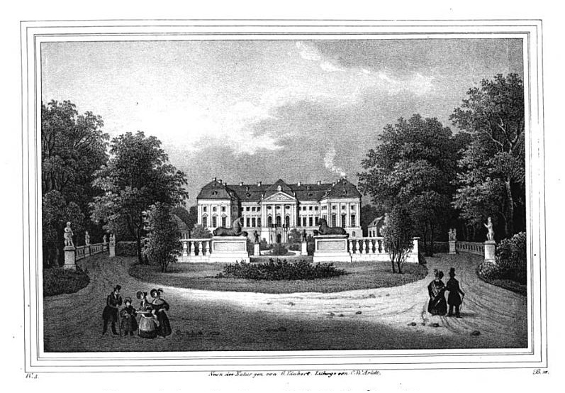 Das adlige Fräuleinstift zu Schloß Joachimstein, gez. von G. Täubert, Lith. von C. W. Arldt, Dresden 1839